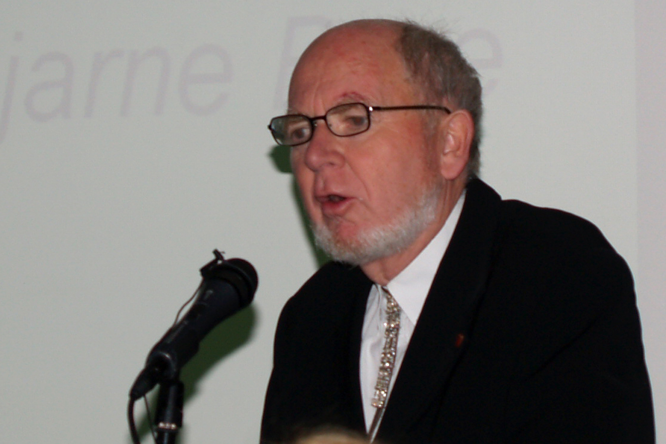 Kirkerådsleder Thor Bjarne Bore taler ved Kirkemøtets åpning